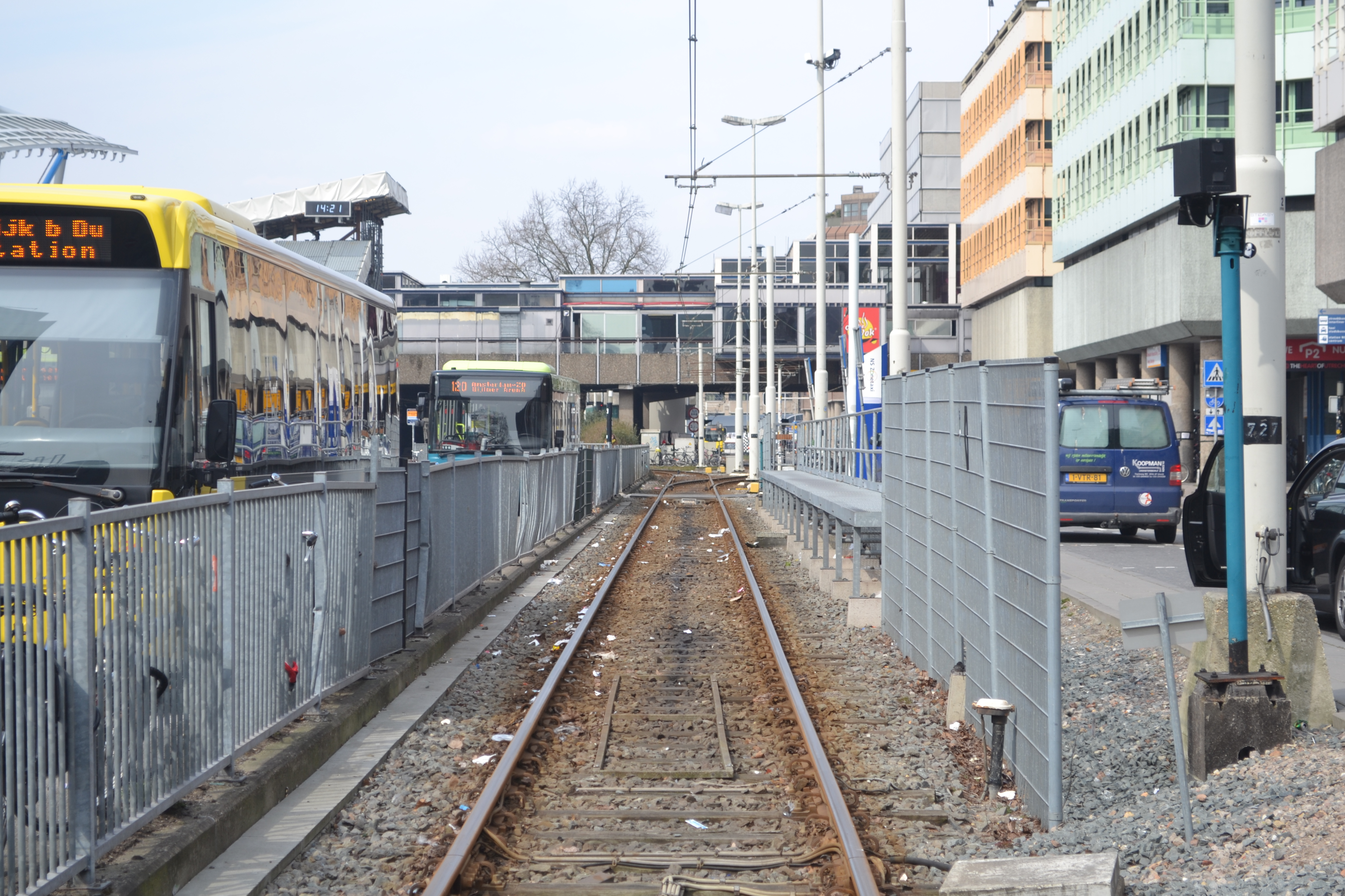 Het keerperron van de Utrechtse sneltram, dat tot midden 2013 in dienst was.